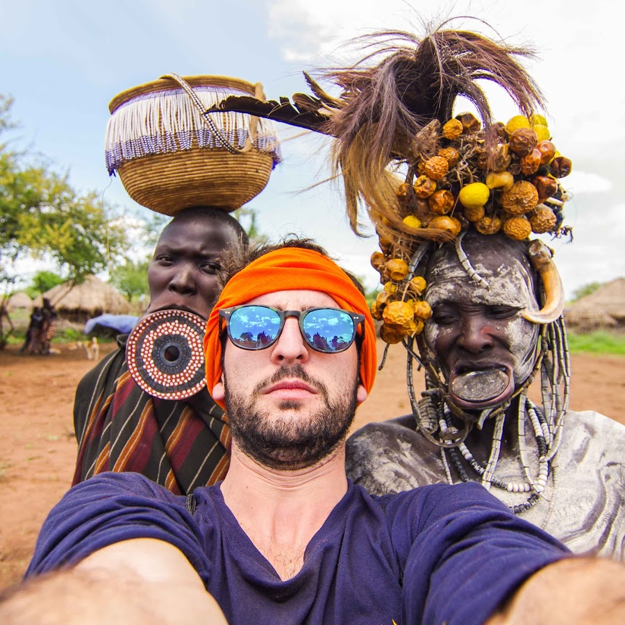 Selfie di Gabriele Saluci in in villaggio Mursi in Etiopia, durante le riprese dei documentari "Etiopia in Ape"